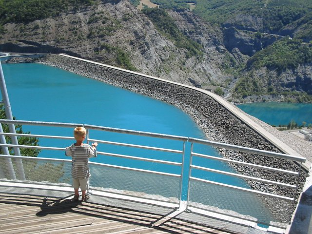 Uitzicht op de stuwdam van Serre-Poncon. De dam (gebouwd van 1955-1961) bij Serre-Ponçon, waar de rivieren Durance en de Ubaye samenkomen, is 124m hoog en 630m breed. Licensing Categorie:Afbeelding Frankrijk